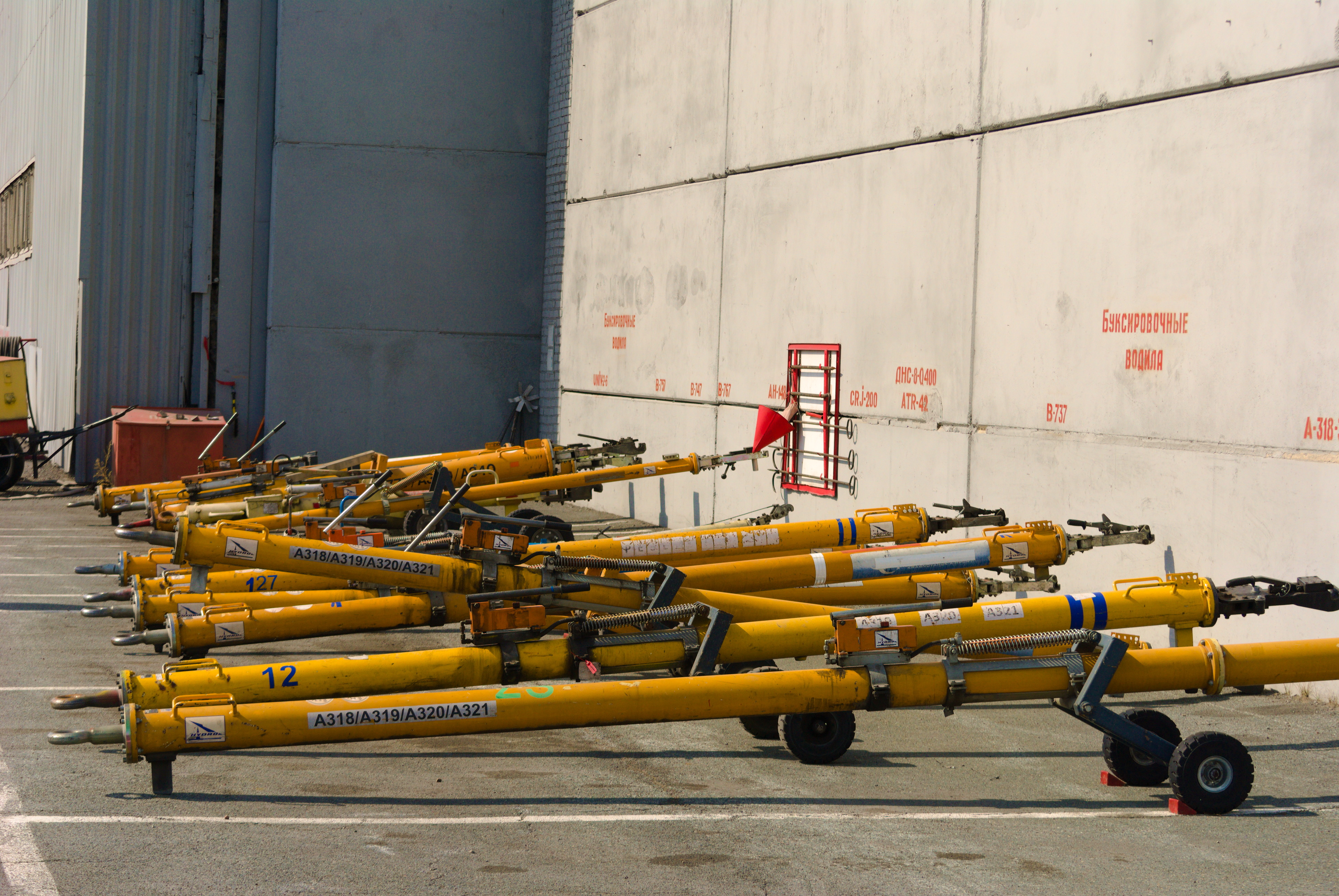 Буксировочные водила в эропорту Красноярска